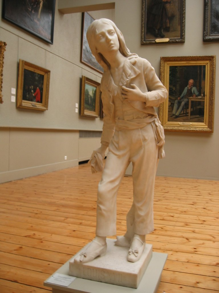 Anne de Chardonnet (1869-1926), Louis XVII au Temple (prison du Temple), musée des beaux-arts et d'archéologie de Besançon.